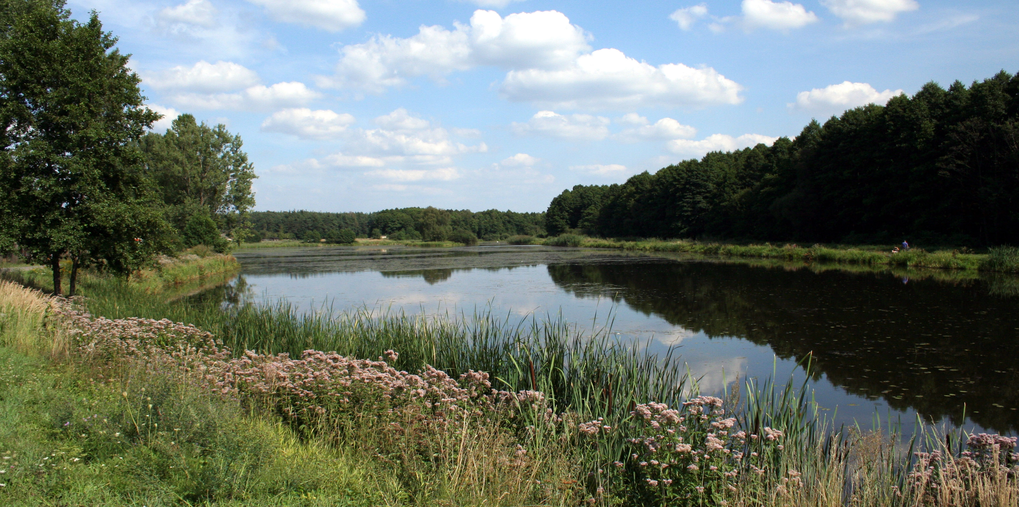 staw hodowlany w Lisowie, powiat lubliniecki